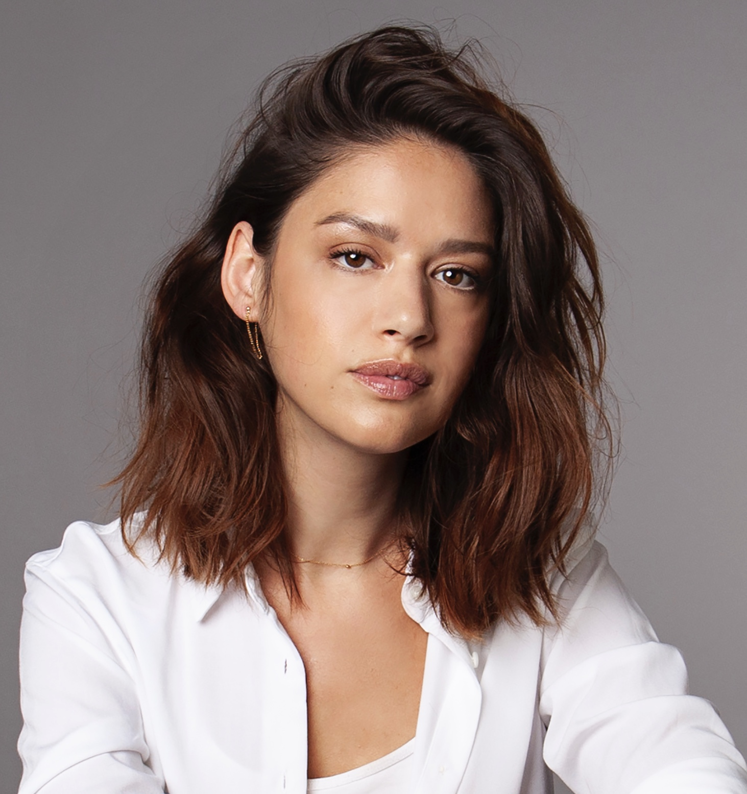 Jamie Grant